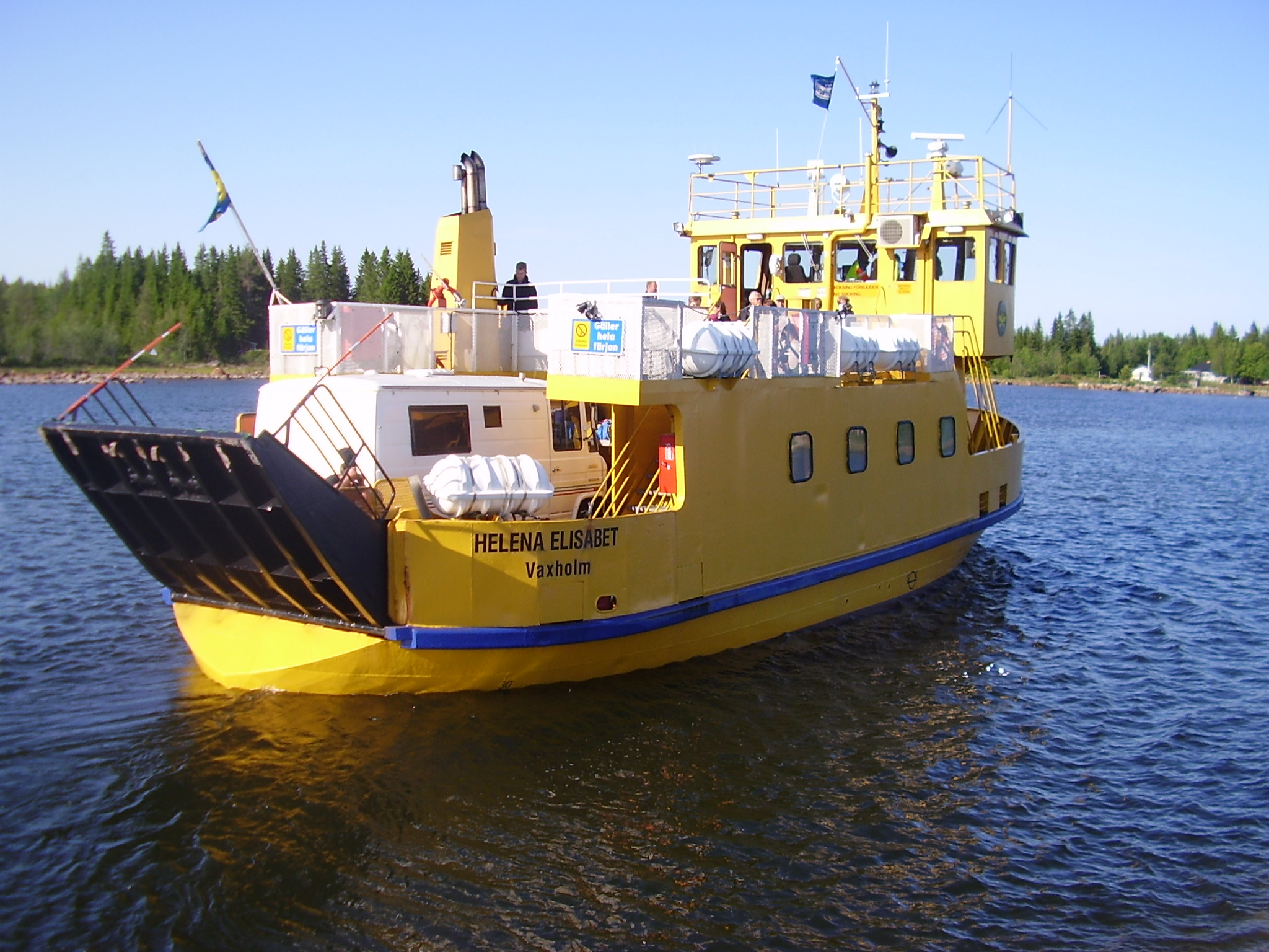 Färjan "Helena Elisabet" som trafikerar Holmöleden utanför Umeå